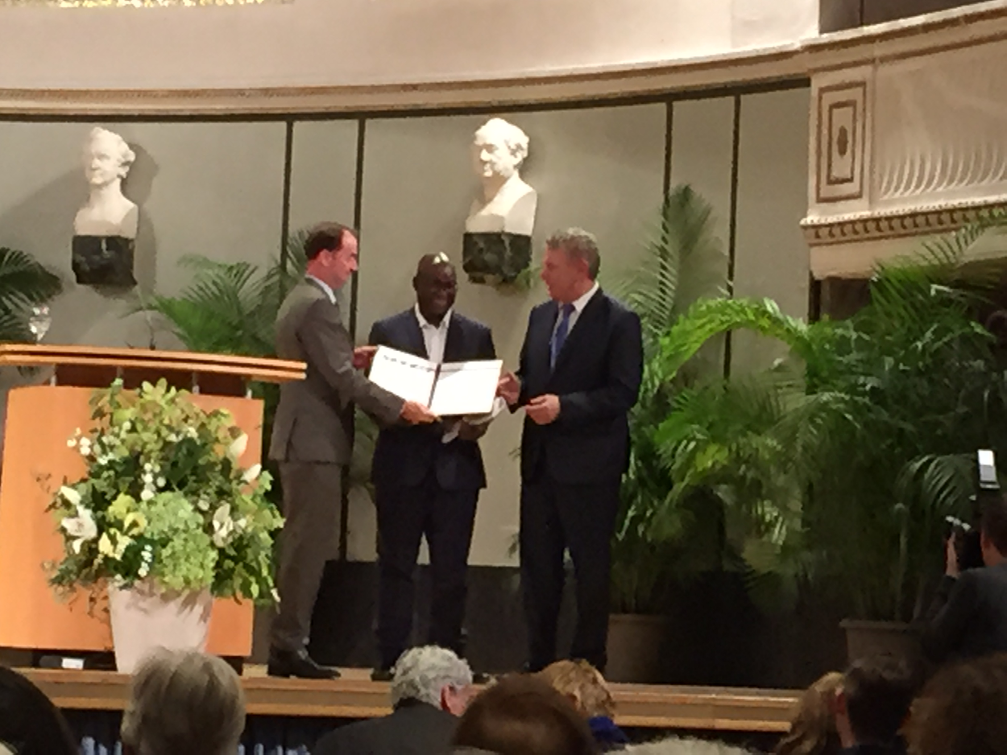 Verleihung des Geschwister-Scholl-Preises 2015 an Achille Mbembe (Mitte). Links: Michael Then, Vorsitzender des Börsenvereins des Deutschen Buchhandels - Landesverband Bayern e. V., rechts: Dieter Reiter, Oberbürgermeister der Landeshauptstadt München